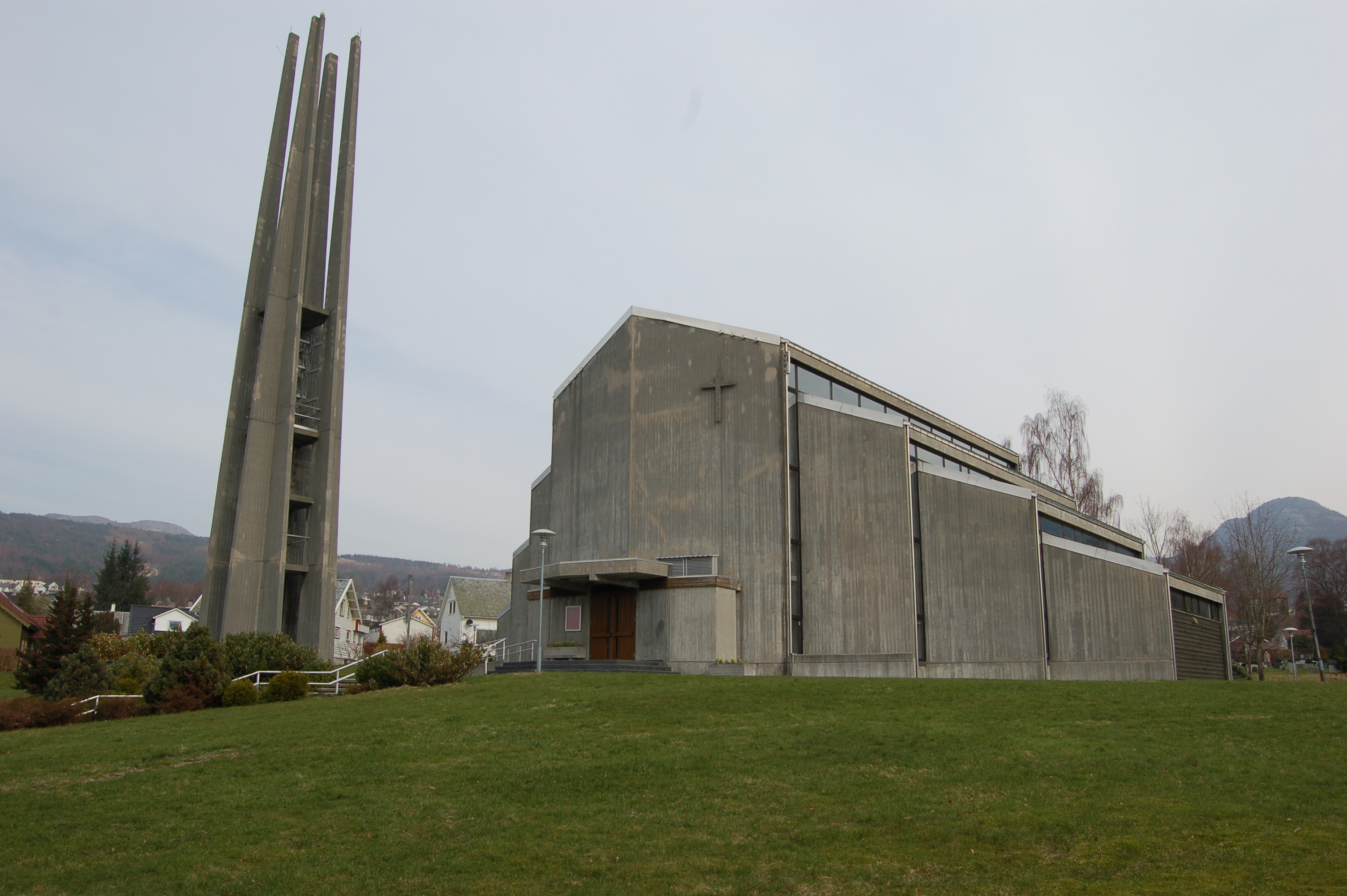 Jørpeland kirke, Strand, Norway